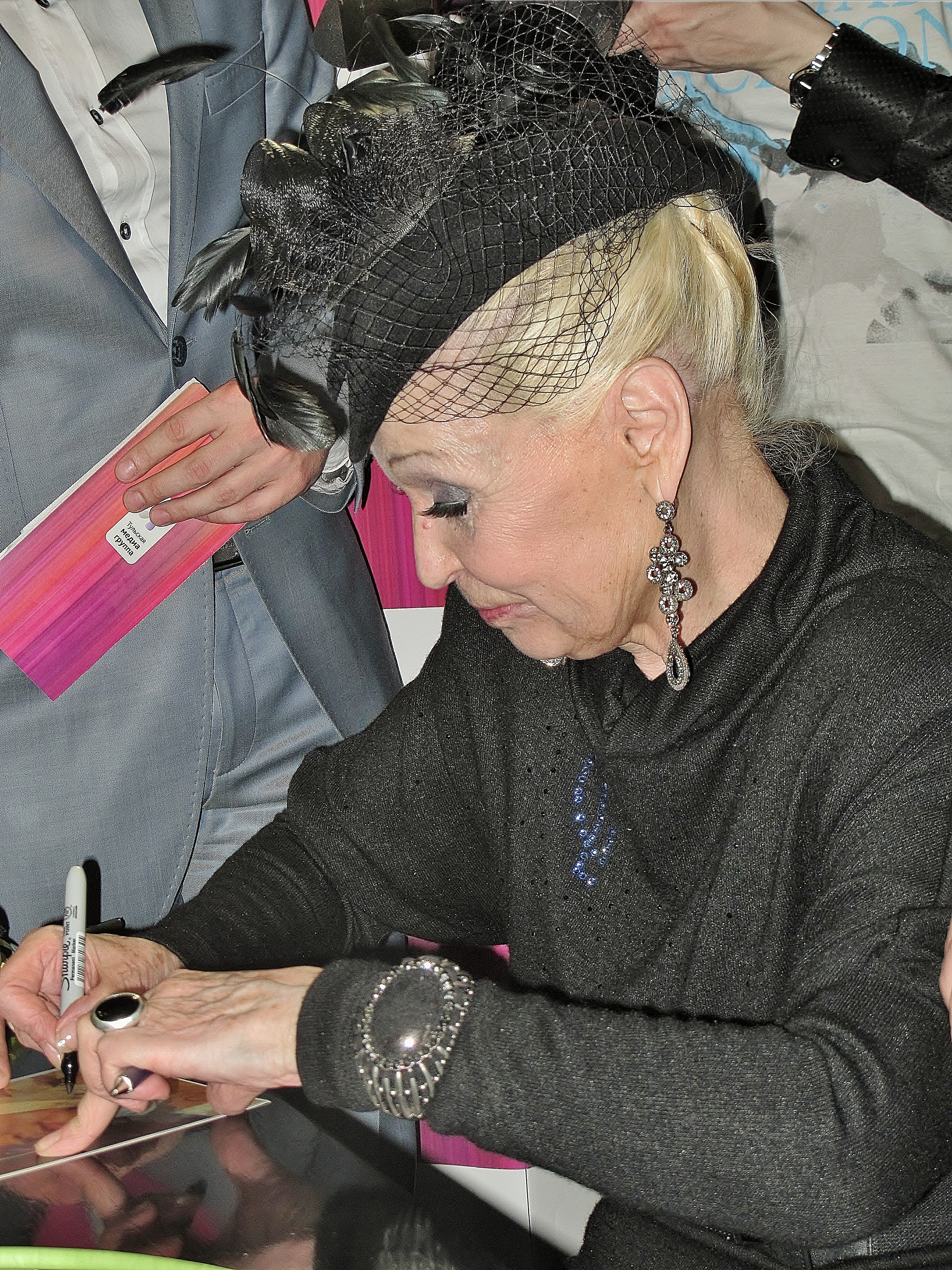 Светлана Светличная в апреле 2012 года